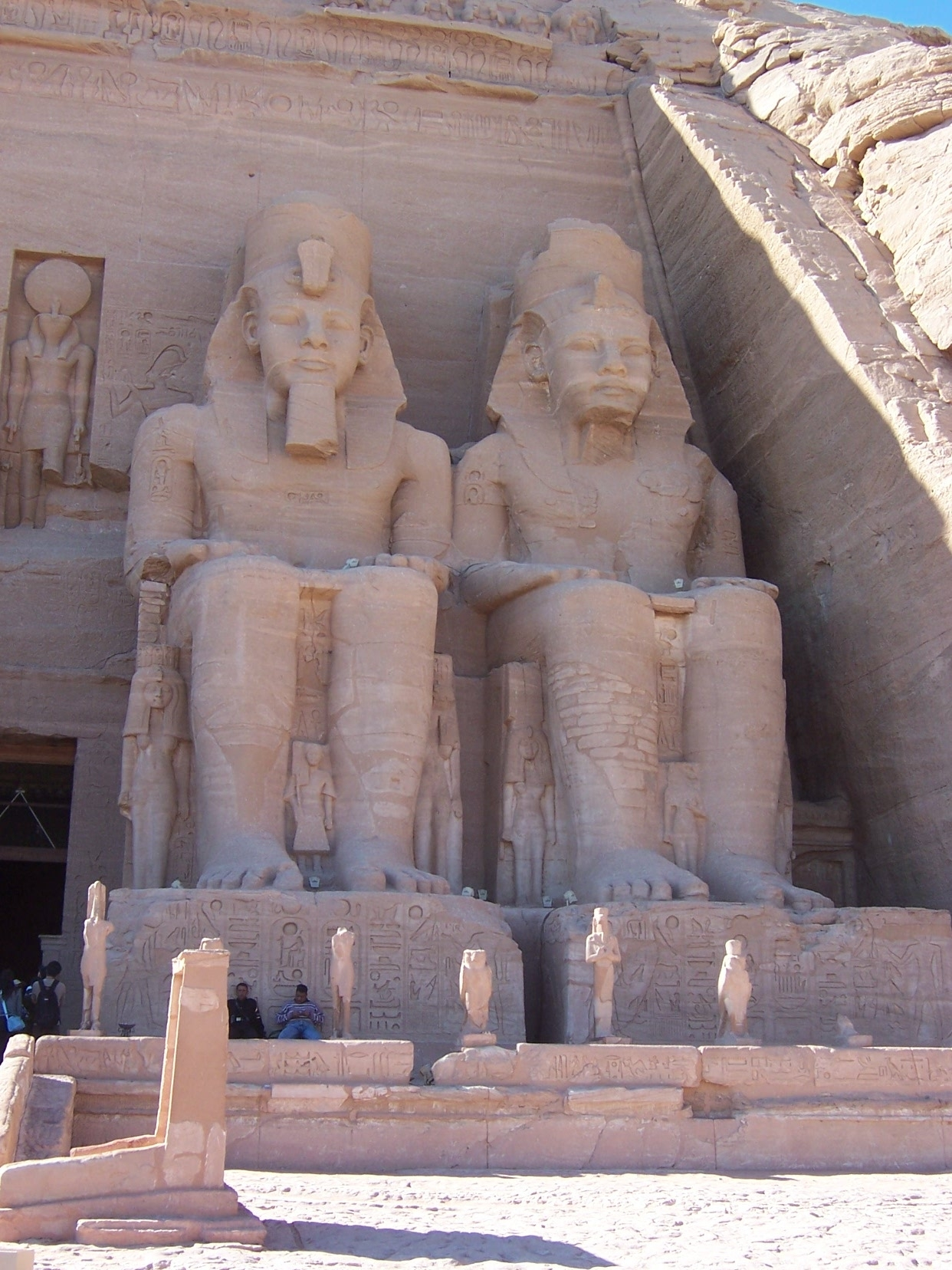 Ancient Temples at Abu Simbel, Egypt